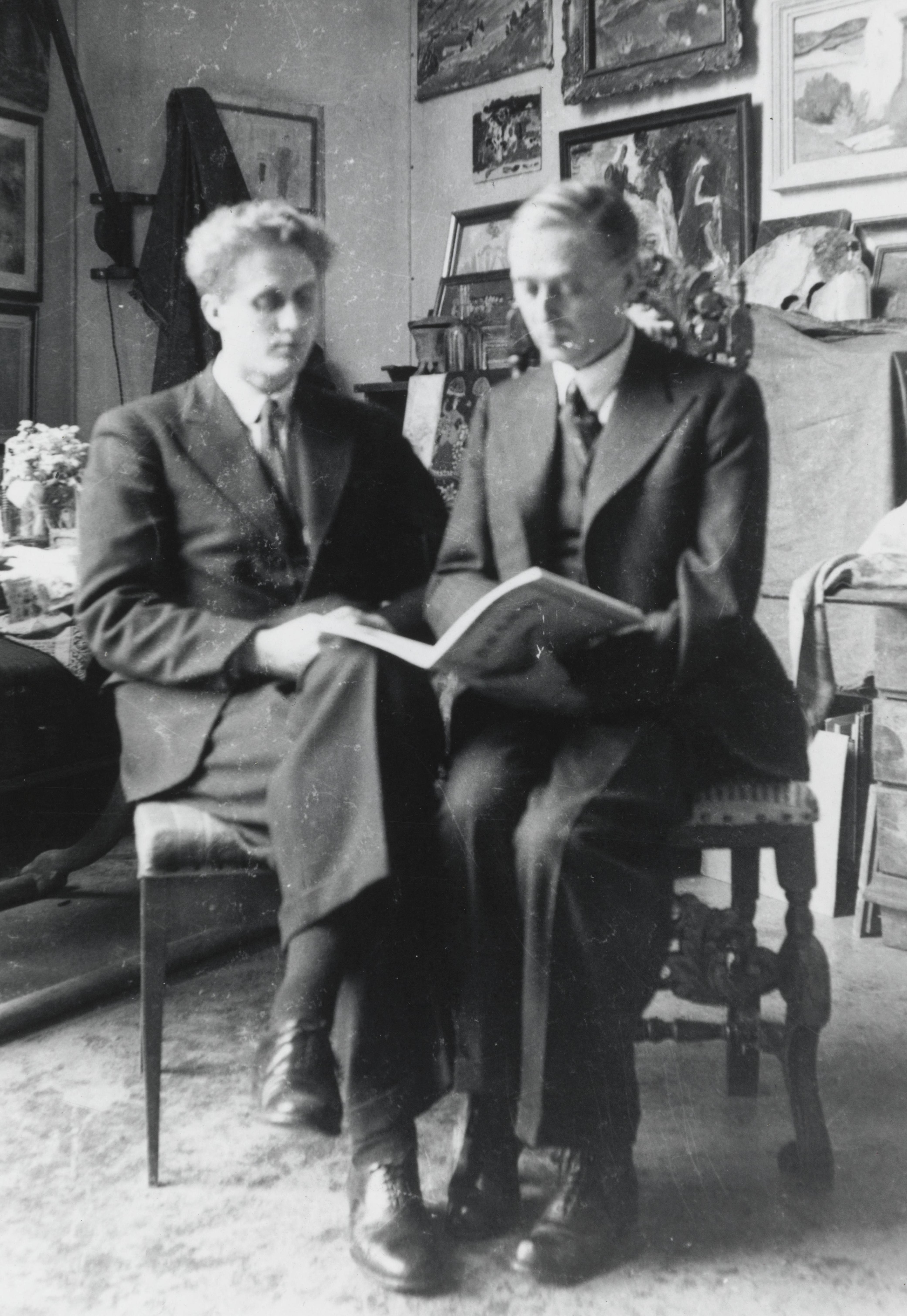 Bildet er hentet fra Nasjonalbibliotekets bildesamling Depicted people: Valen, Fartein and Valen-Sendstad, Magne